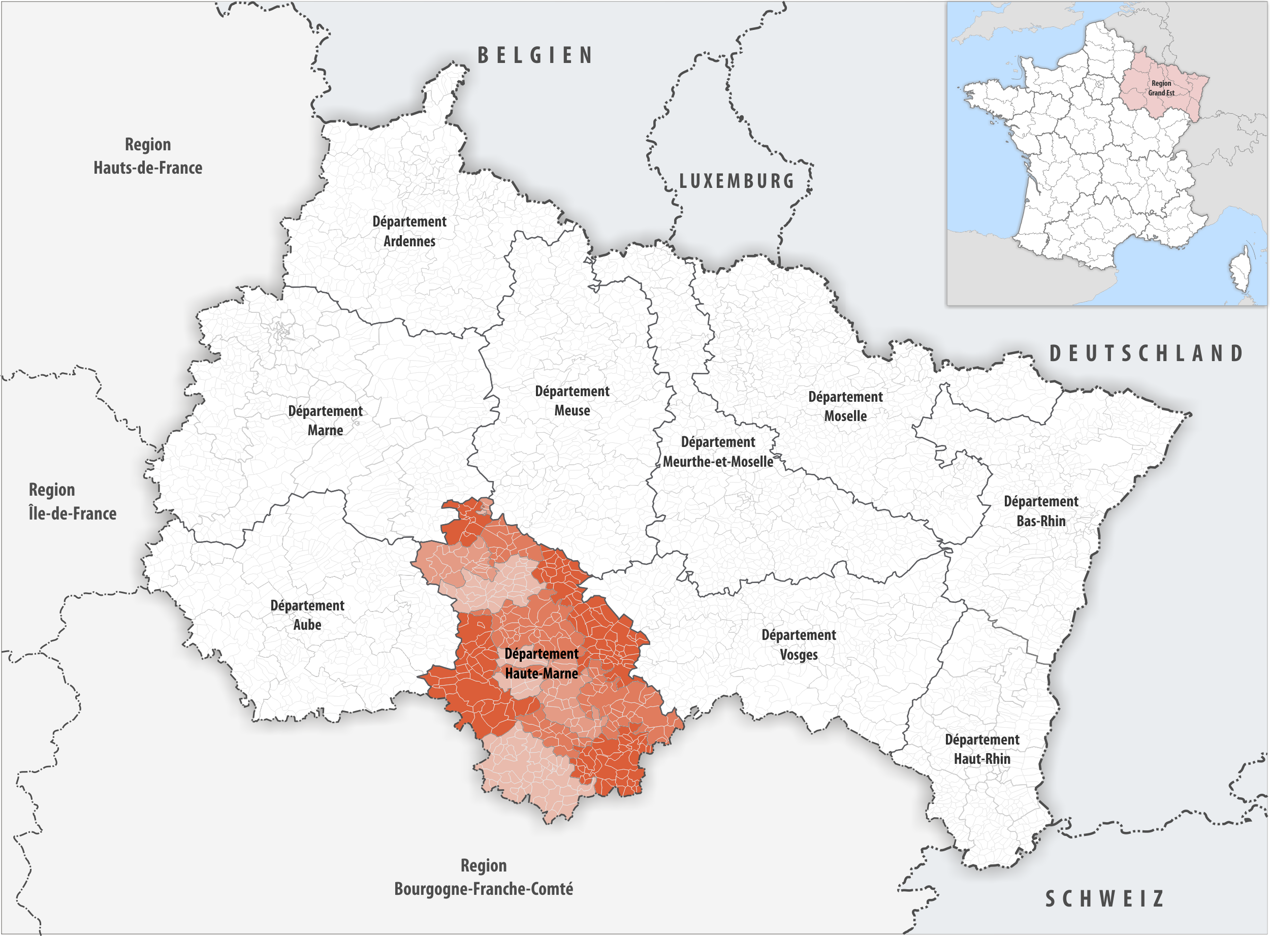 Lage des Departements Haute-Marne